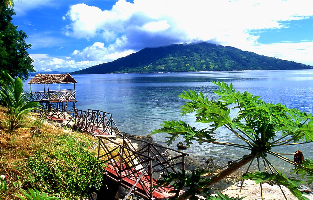 Nosy Komba, l'ile aux lémuriens" impose son cratère volcanique de 627 mètres dans la région de Nosy Bé. Vue depuis l'hotel de Constance "le Dauphin Bleu"